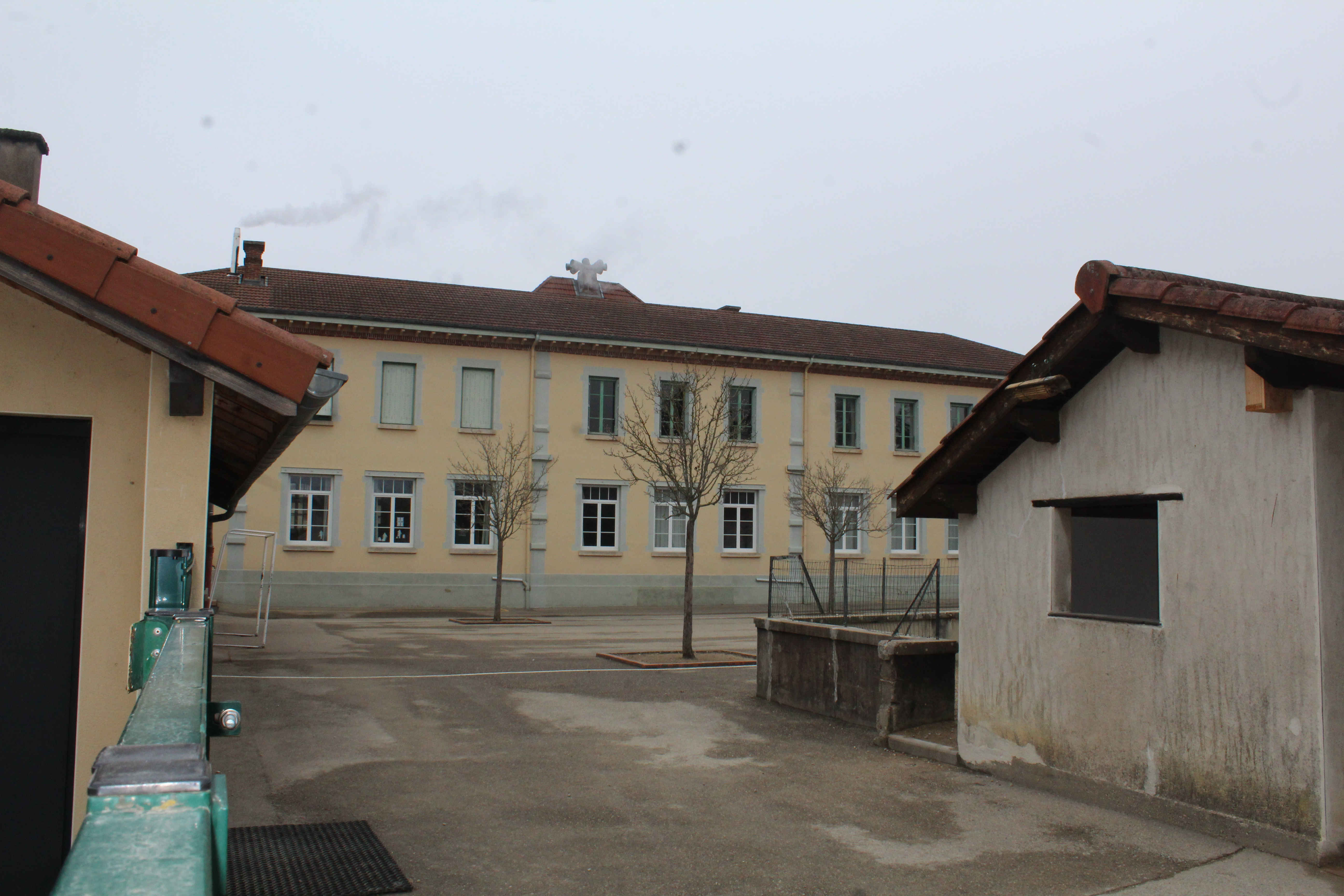 École élémentaire de Neuville-les-Dames.